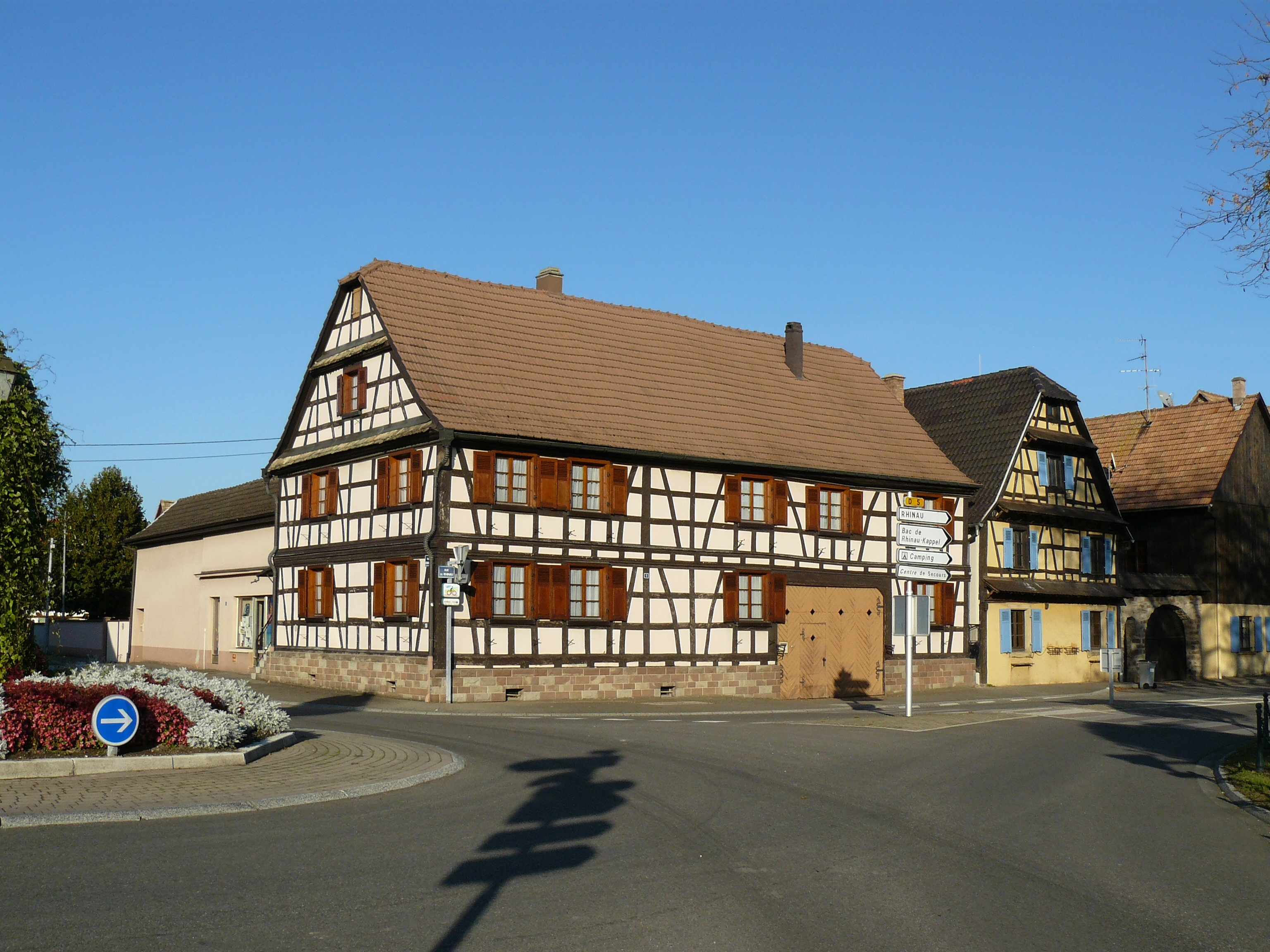 Maison à colombages